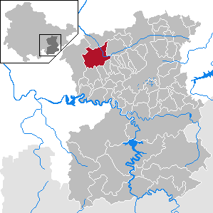 Pößneck in Thuringia - Saale-Orla-Kreis